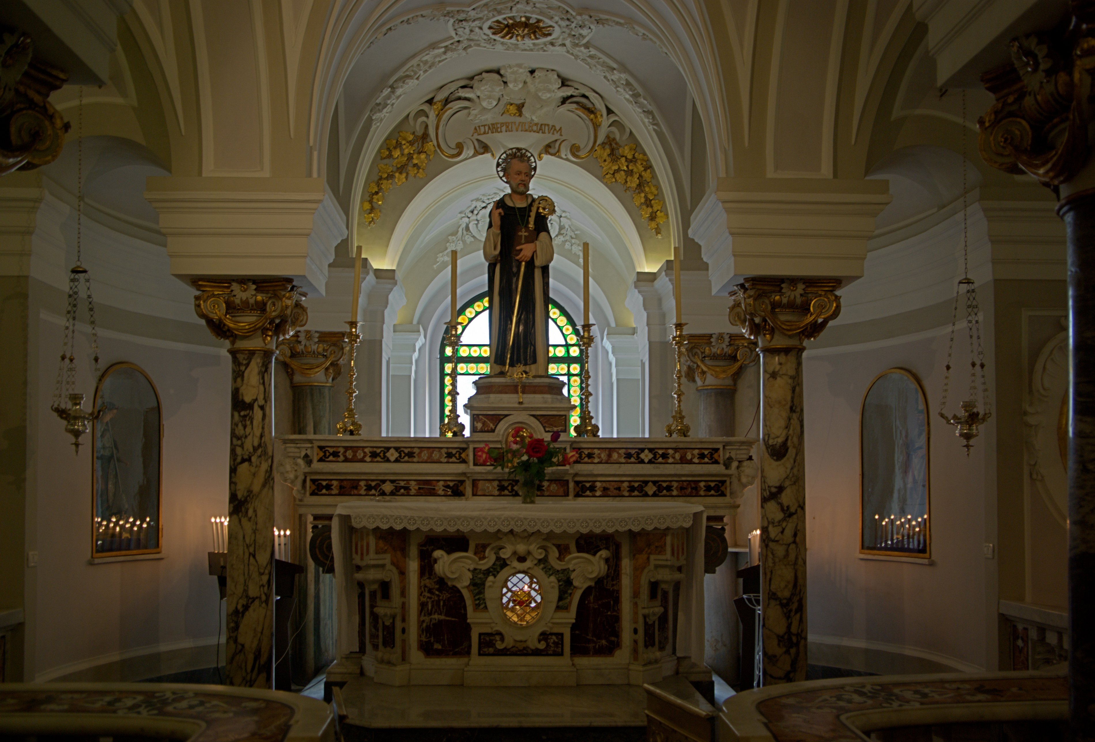 Sorrento, Chiesa S. Antonino